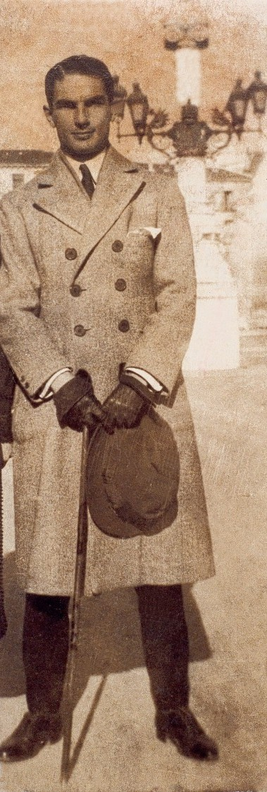 José María de Amilibia y Machimbarrena